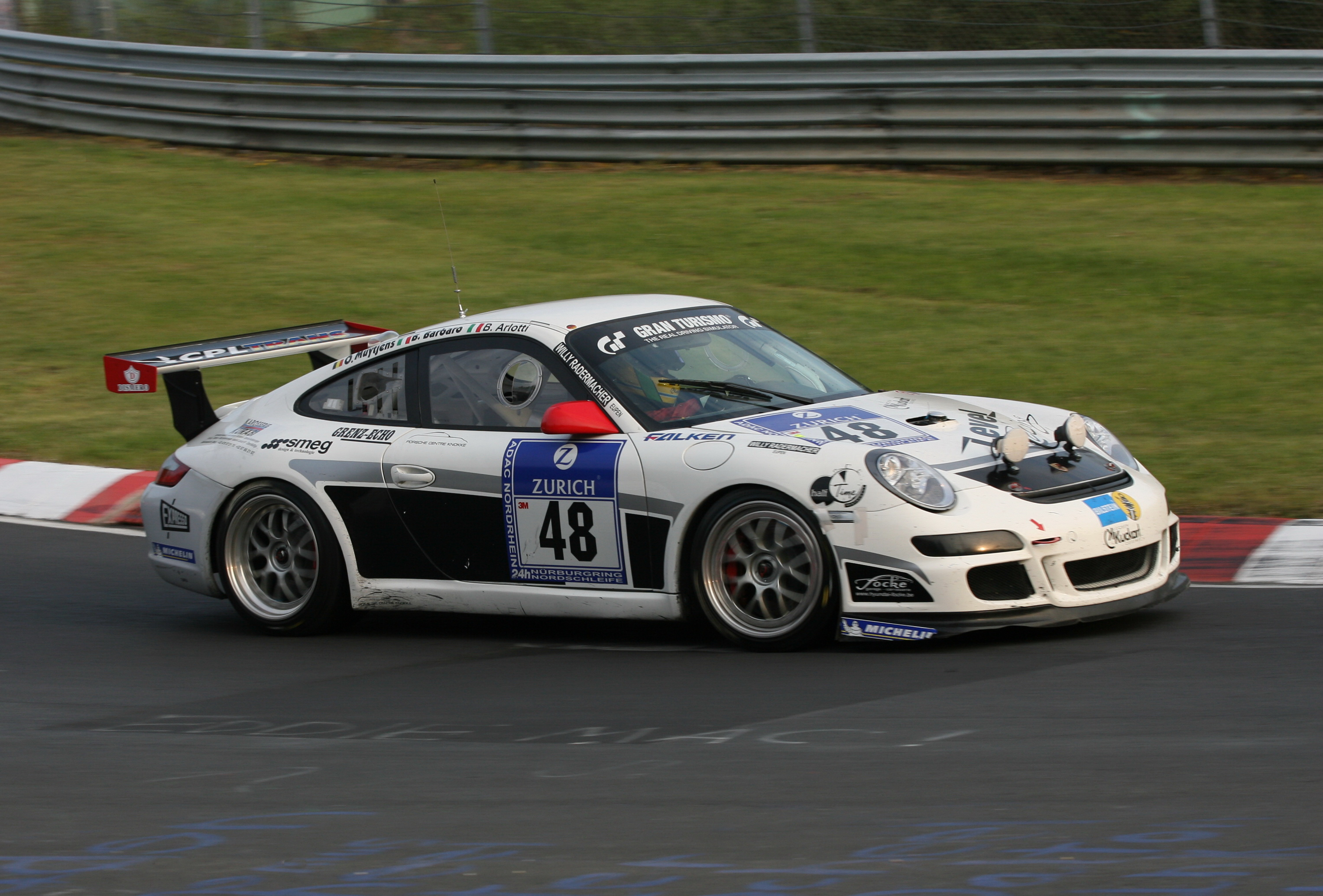 Porsche 997